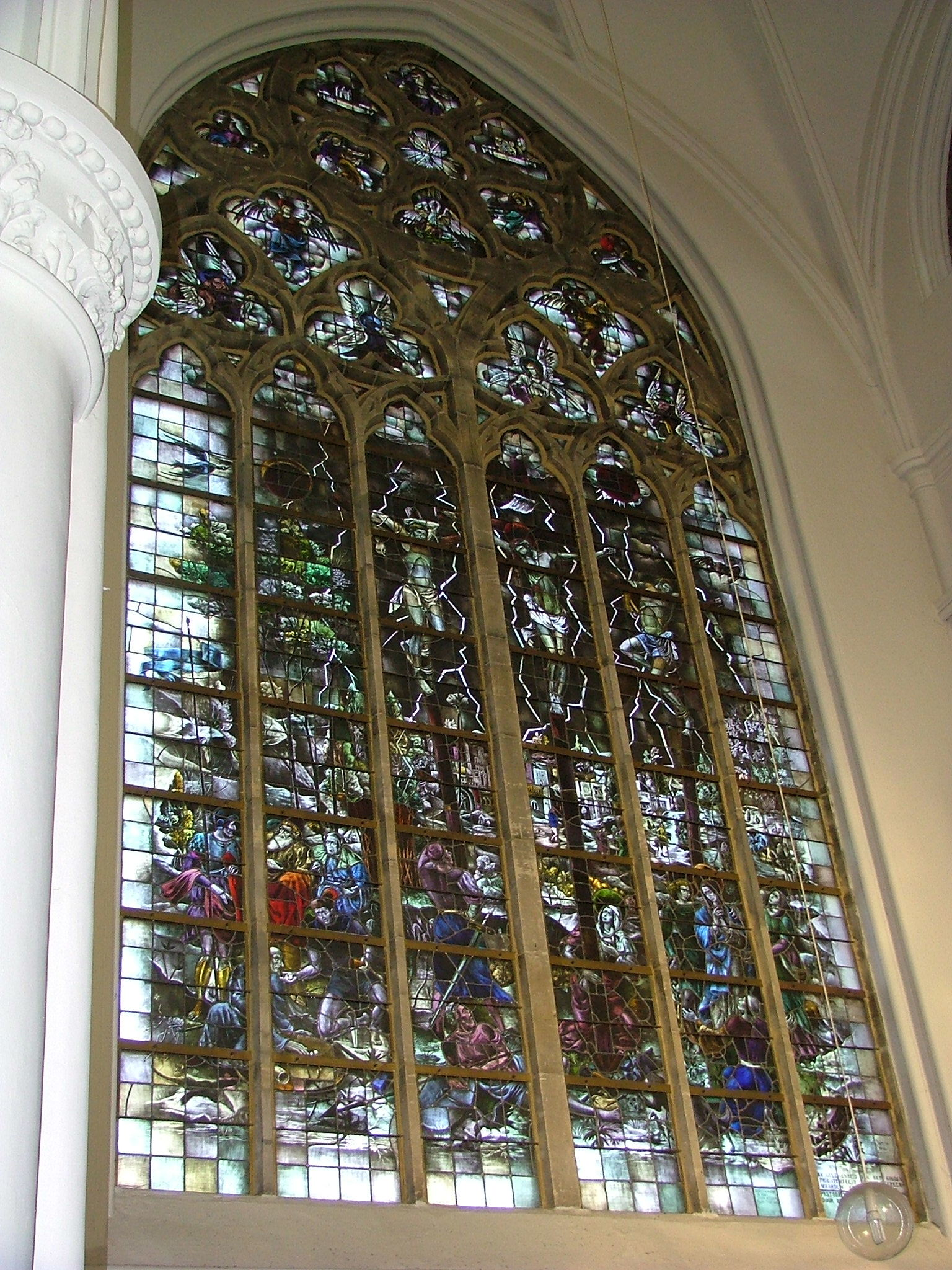 ik heb deze foto gemaakt voor een opdracht van school het is een glaswerk voor de kerk van Thorn